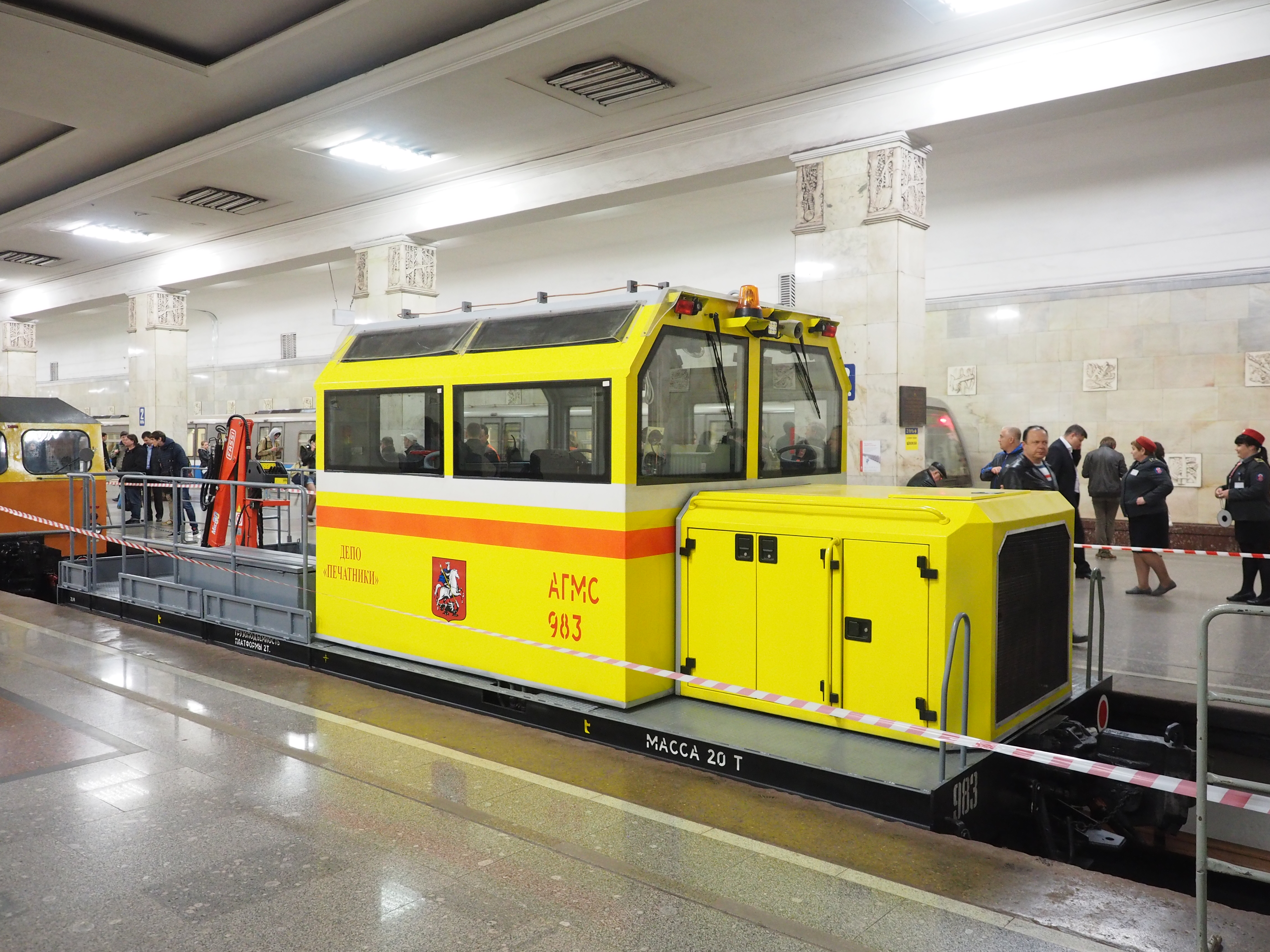 Мотовоз АГМС №983 выпуска 1996 года после модернизации на Камбарском заводе. Moscow metro diesel shunter AGMS-983. Bulit in 1996 by the Perm plant, reconstructed by the Kambarka plant. On May 15 and 16, 2015, Moscow Metro celebrated its 80th anniversary. For the first time, service cars were exhibited at the siding track of Partizanskaya station. Earlier, historical cars were exhibited there. 15 и 16 мая 2015 в Москве отмечалось 80 лет Московскому метро. Впервые была устроена выставка служебных вагонов. Они были расставлены на 3 пути станции Партизанская. Перед этим также проводилась выставка музейных вагонов